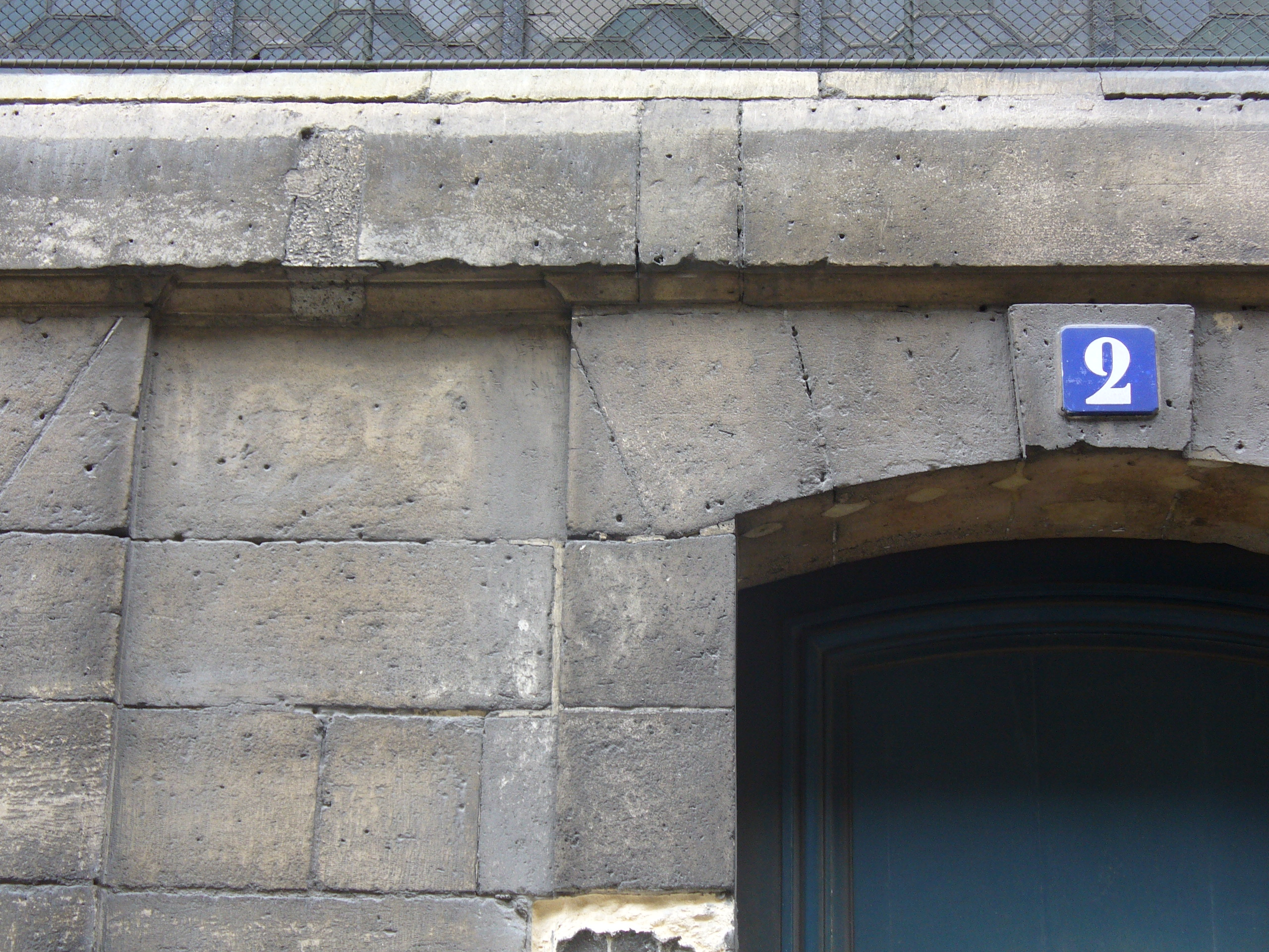 Ancienne numérotation des rues au 2 rue Garancière (Paris, 6° arrondissement) (anciennement 096).